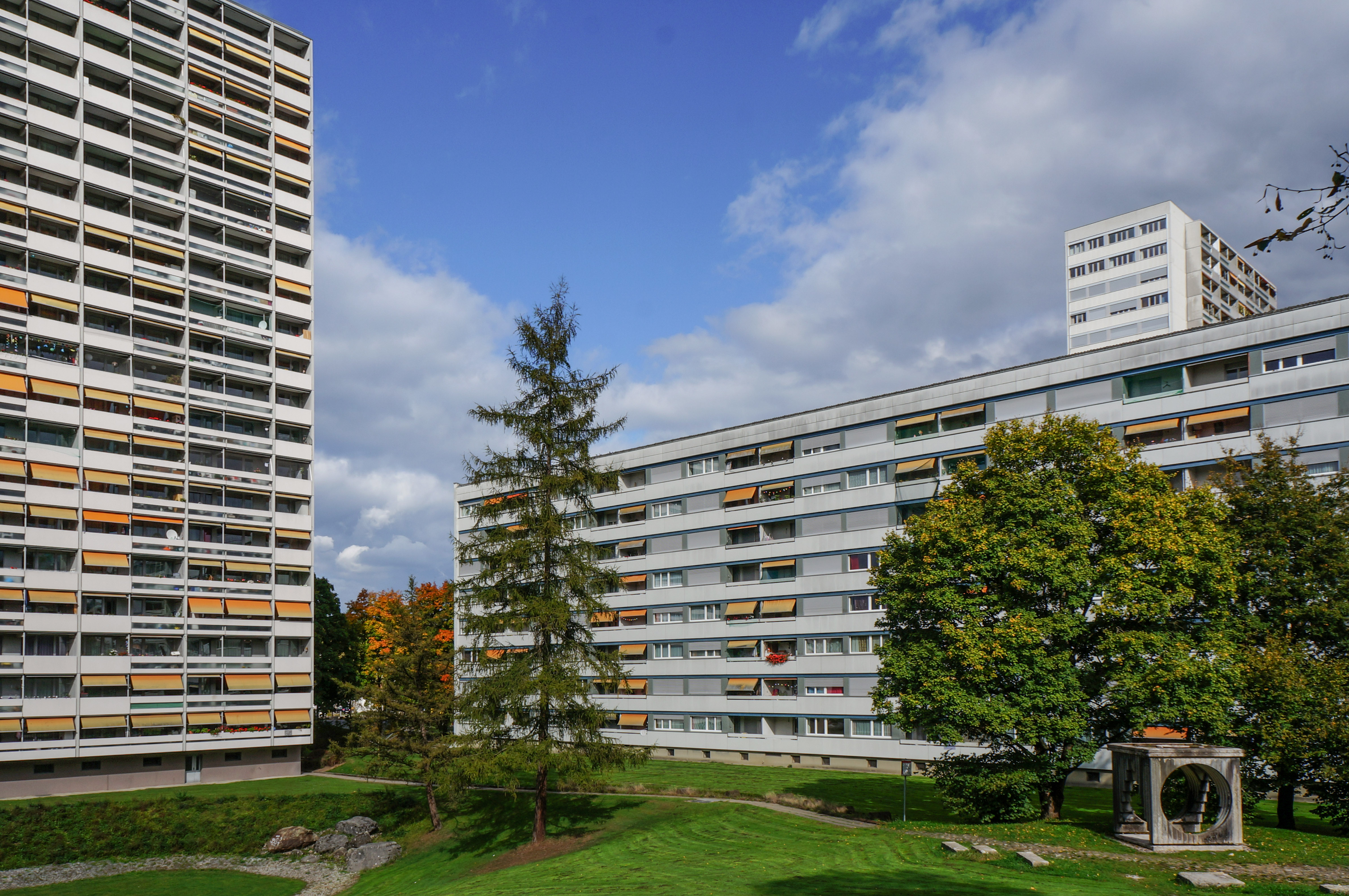 Überbauung Tscharnergut, Aussenraum mit Spielwiese im Vordergrund und Marabut vorne rechts, Hochhaus (links und im Hintergrund) und Scheibenhaus (rechts), Juni 2017.